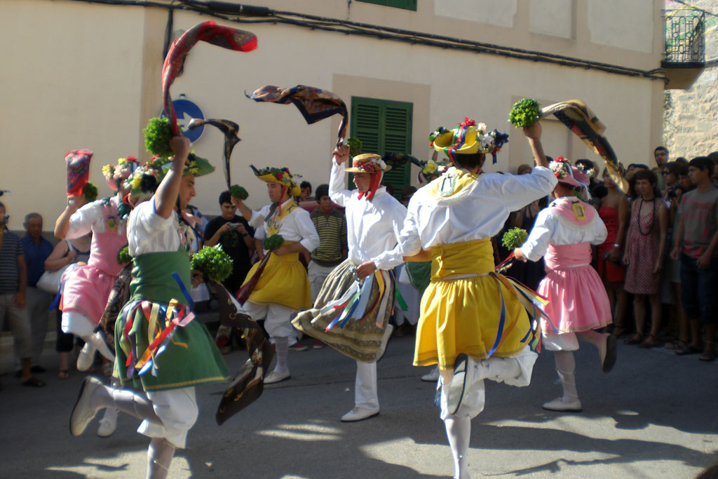 Els cossiers de Montuïri ballant als quatre cantons el dia de Sant Bartomeu 2008.